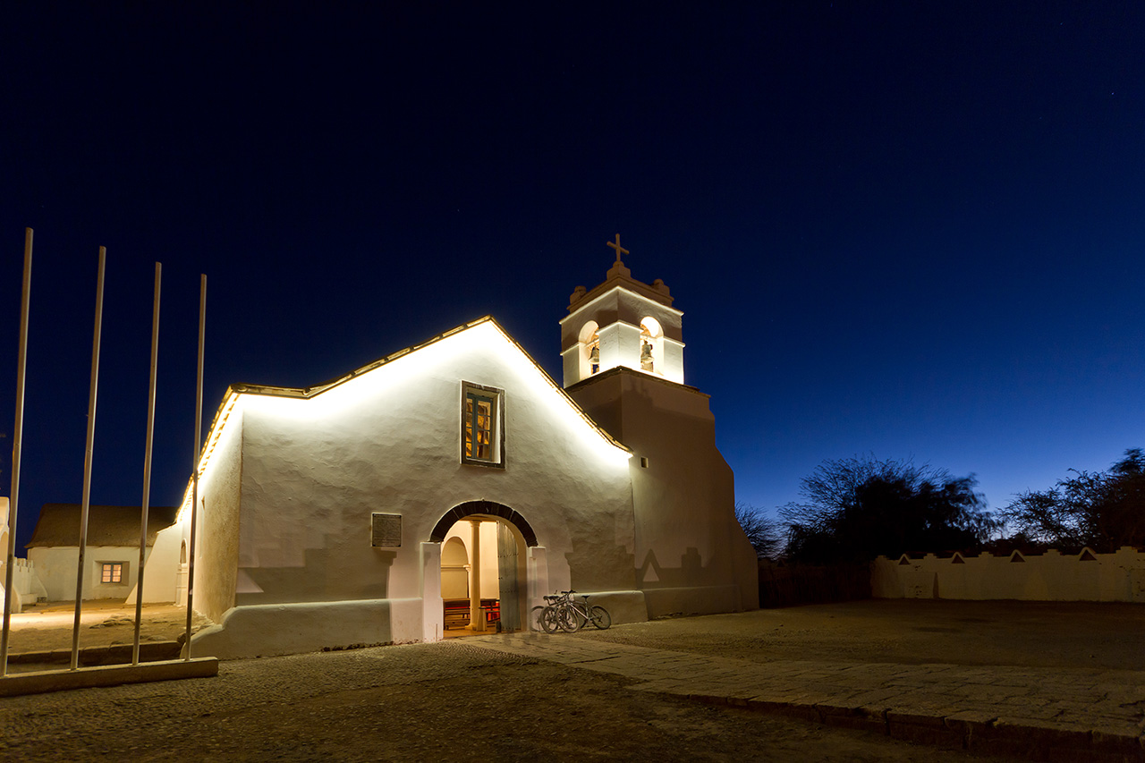 Iglesia de San Pedro de Atacama This is a photo of a national monument in Chile: 301